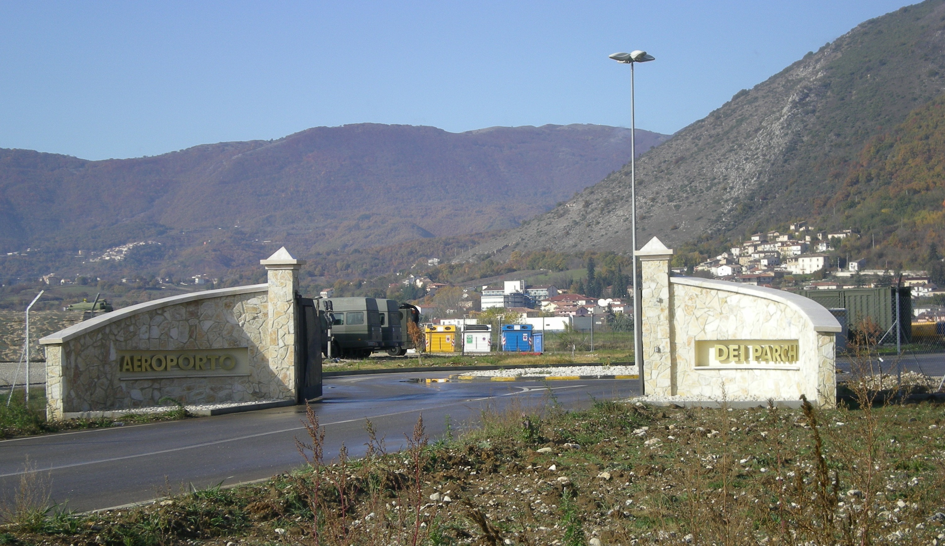 Entrata principale dell'Aeroporto dell'Aquila, meglio conosciuto come Aeroporto dei Parchi, sito in località Preturo